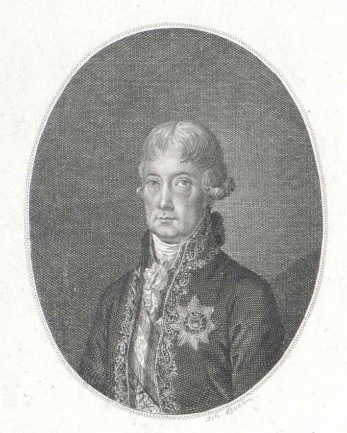 Heinrich Franz Graf von Rottenhan (1737–1809)